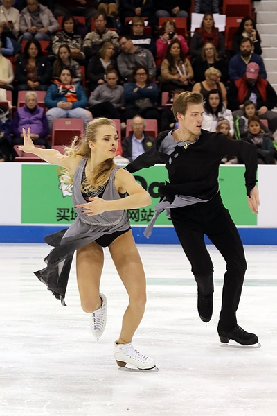 Виктория Синицина и Никита Кацалапов на этапе Гран-при Skate America 2017